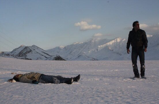 فیلم محدوده ابری